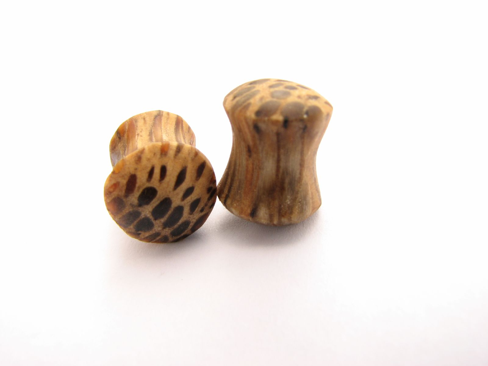 Foxtail palm plugs